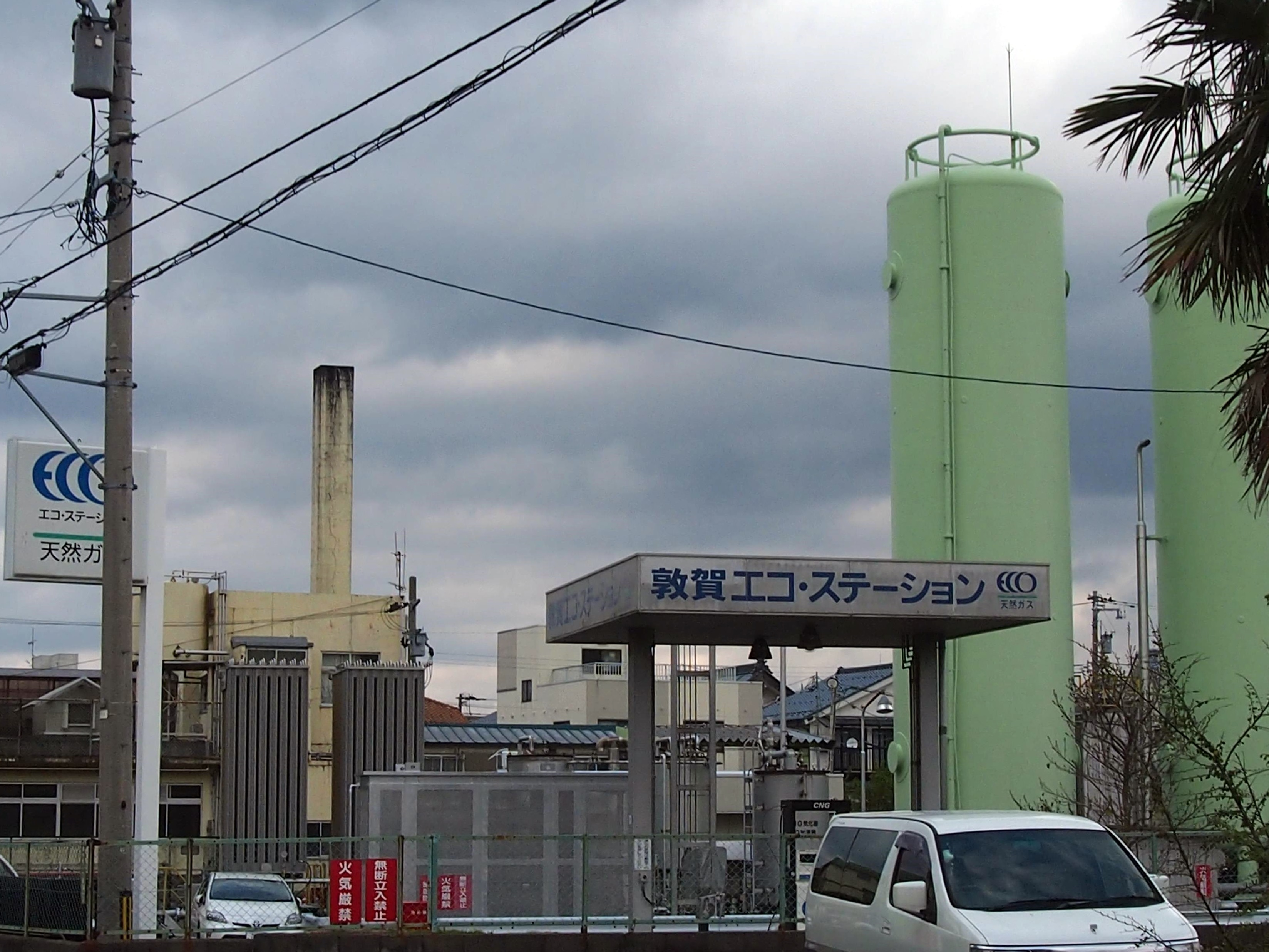 敦賀ガスのガスステーション